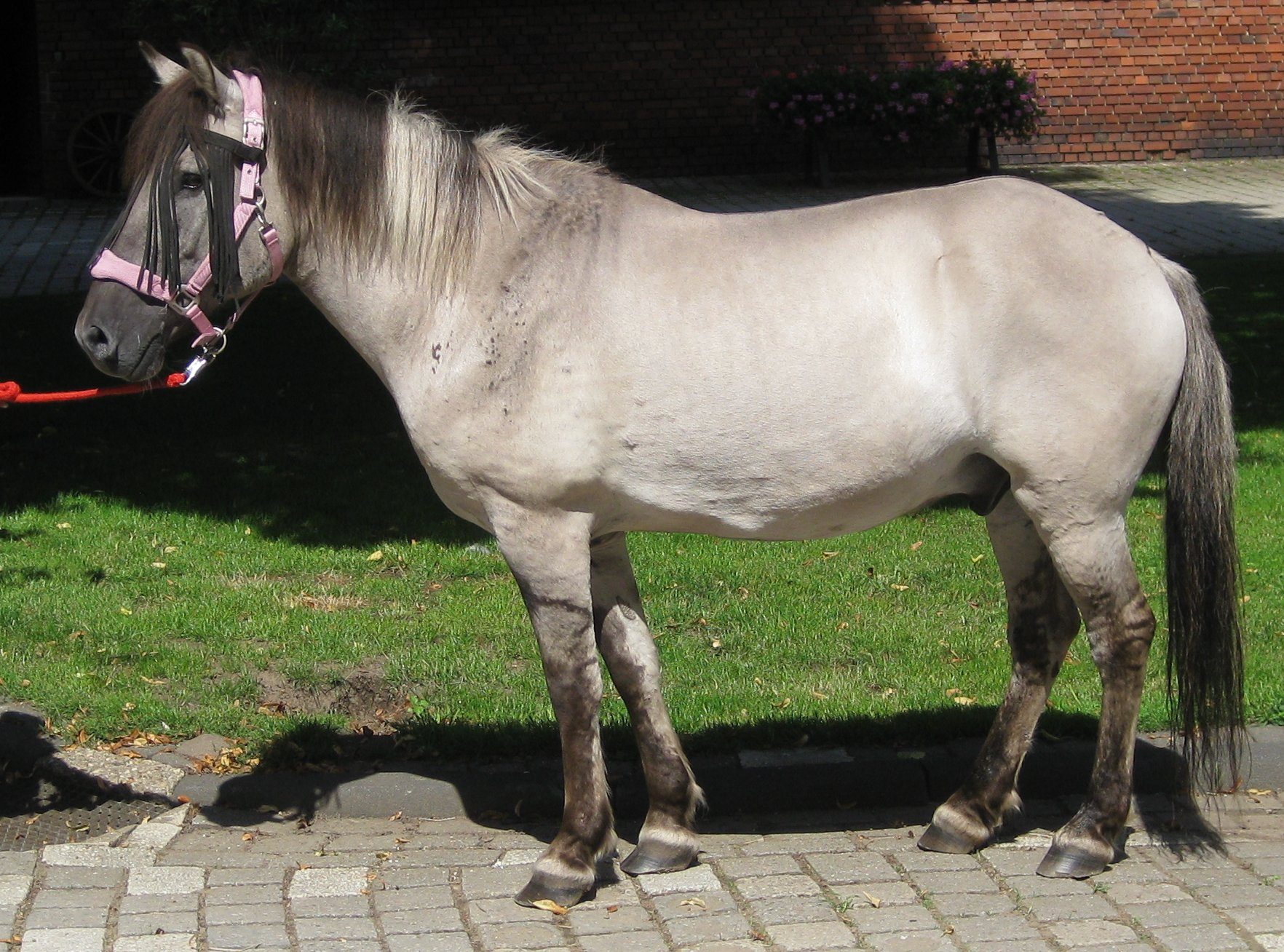 Mausfalber Konik mit Wildzeichnung self made picture